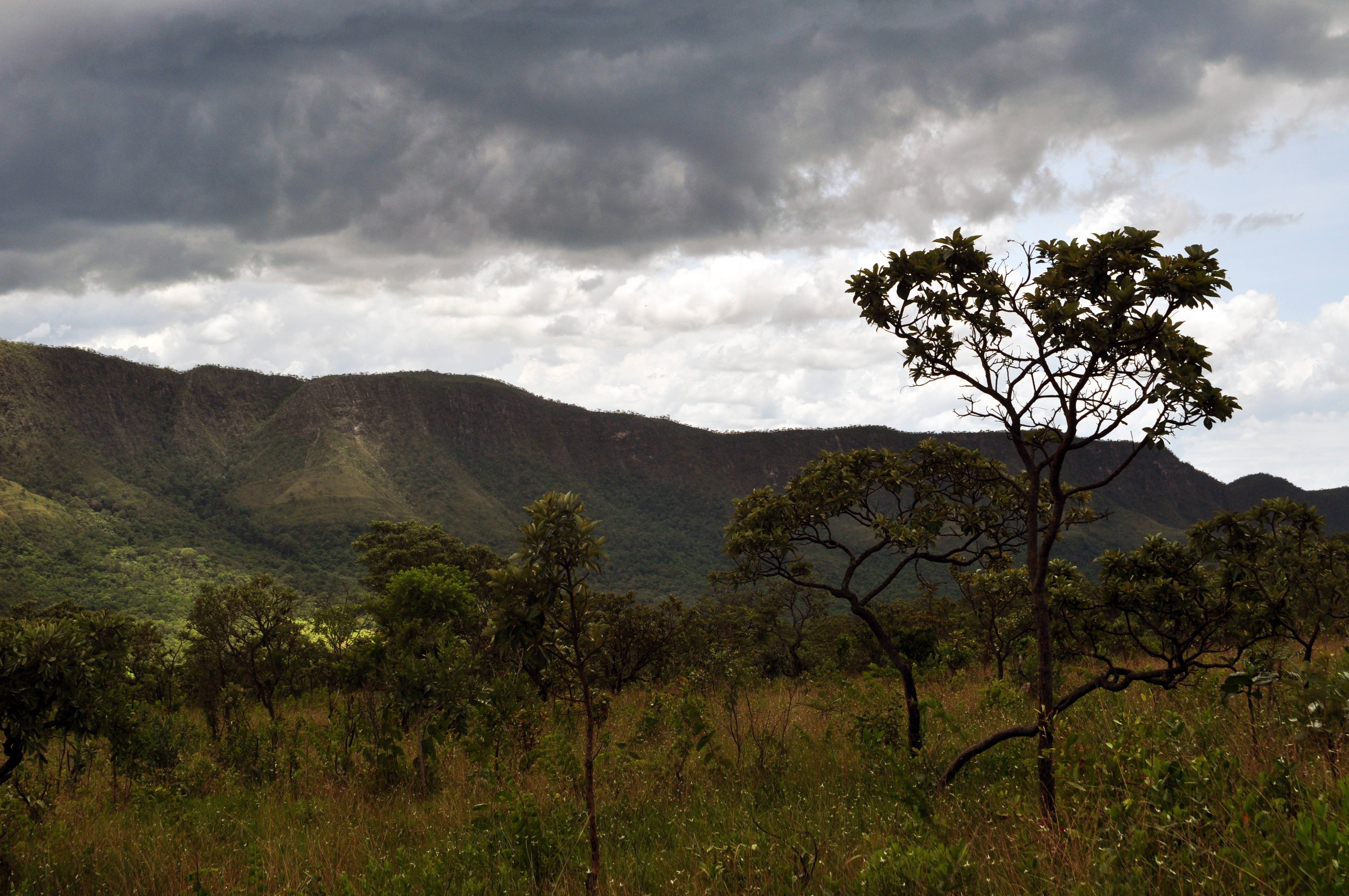 Vegetação e paisagem dentro do parque nacional.